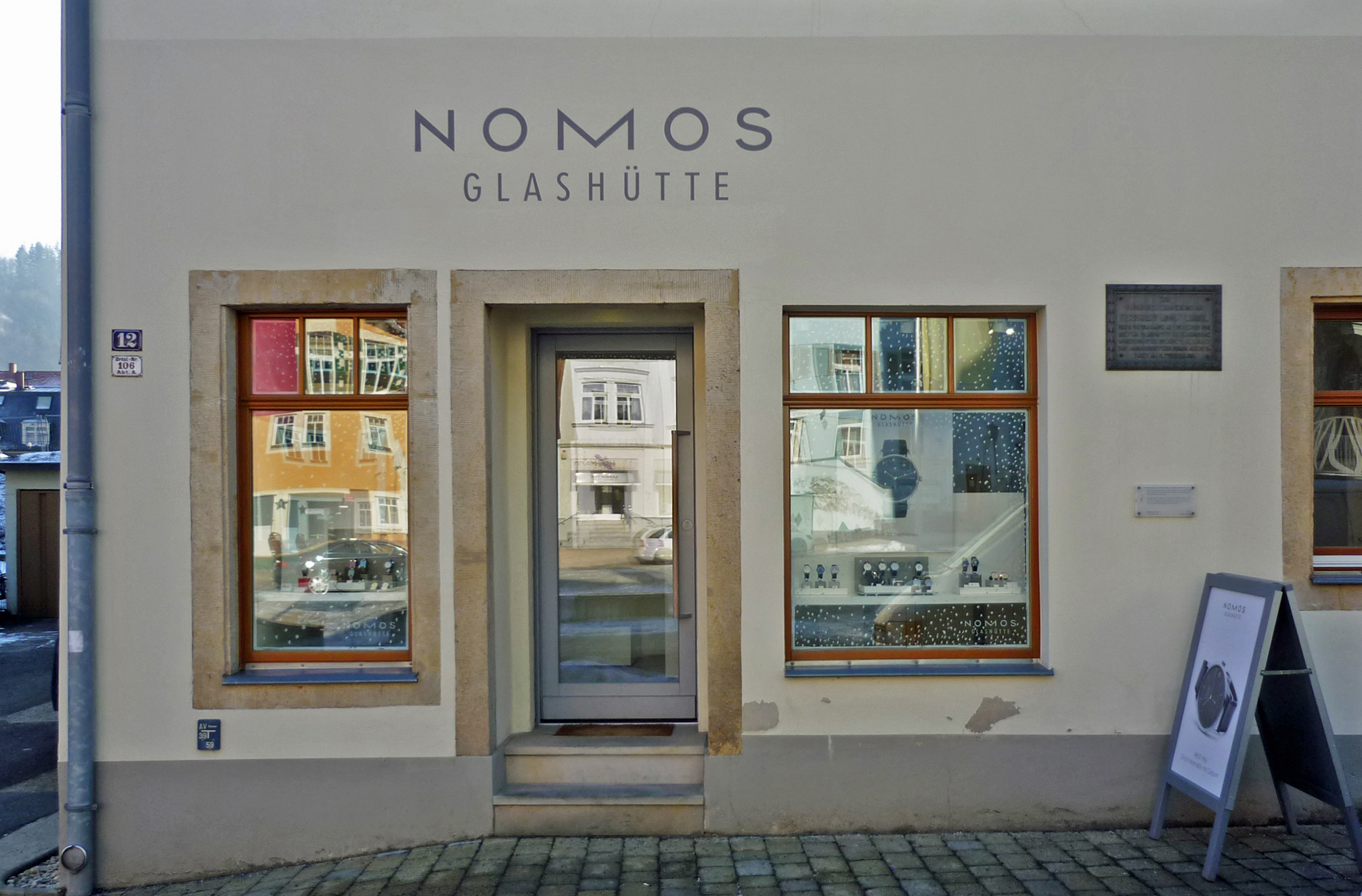 Glashütte, Hauptstr. 12, hier wurde 1845 die Glashütter Uhrenindustrie durch F. A. Lange begründet, jetzt Nomos Glashütte